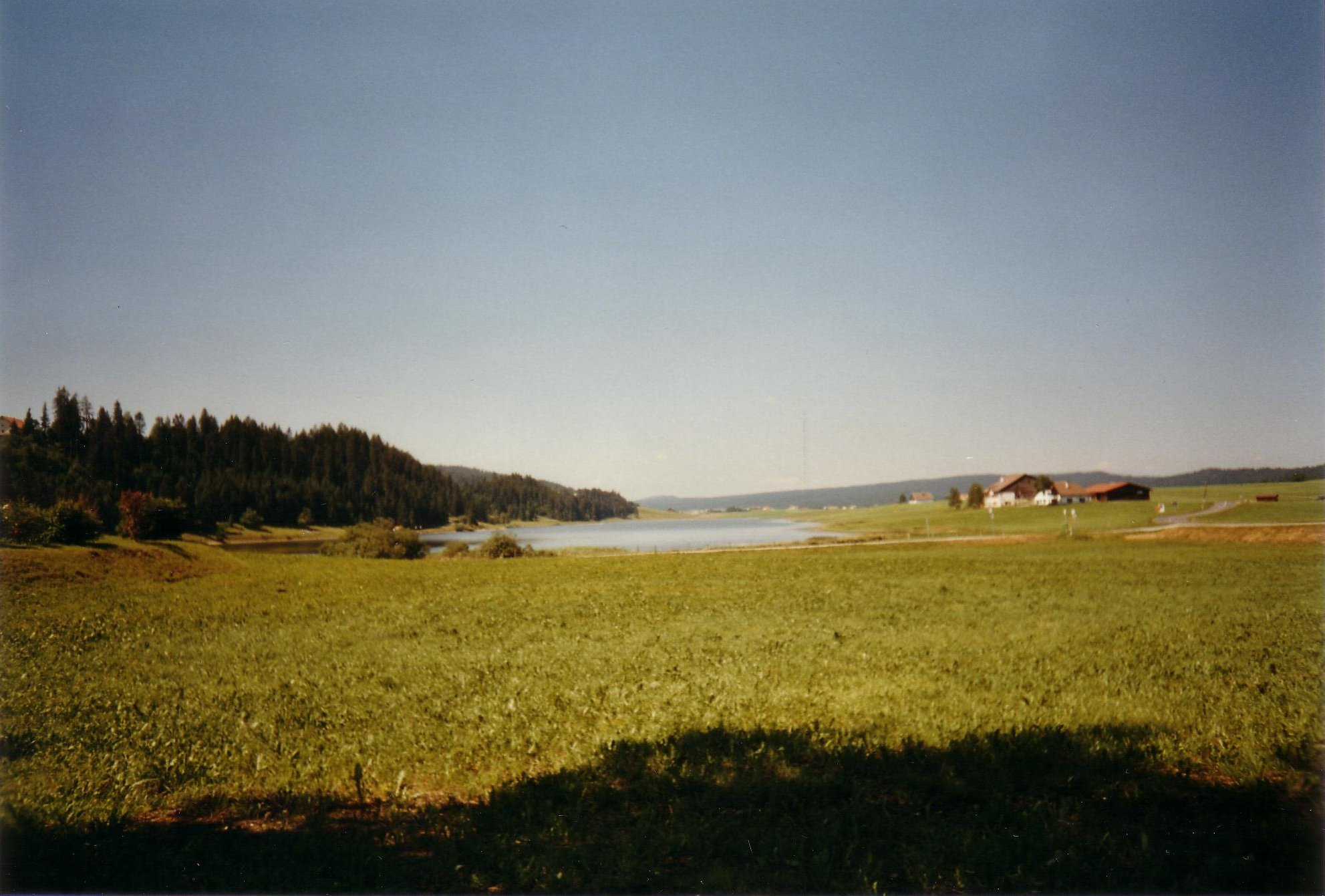 Der Lac des Taillères bei La Brévine